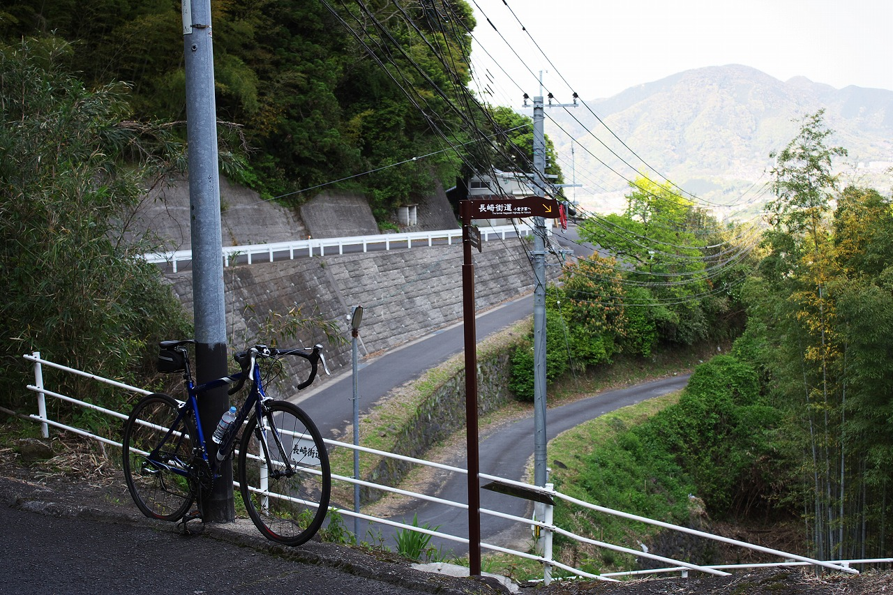 長崎街道日見峠付近